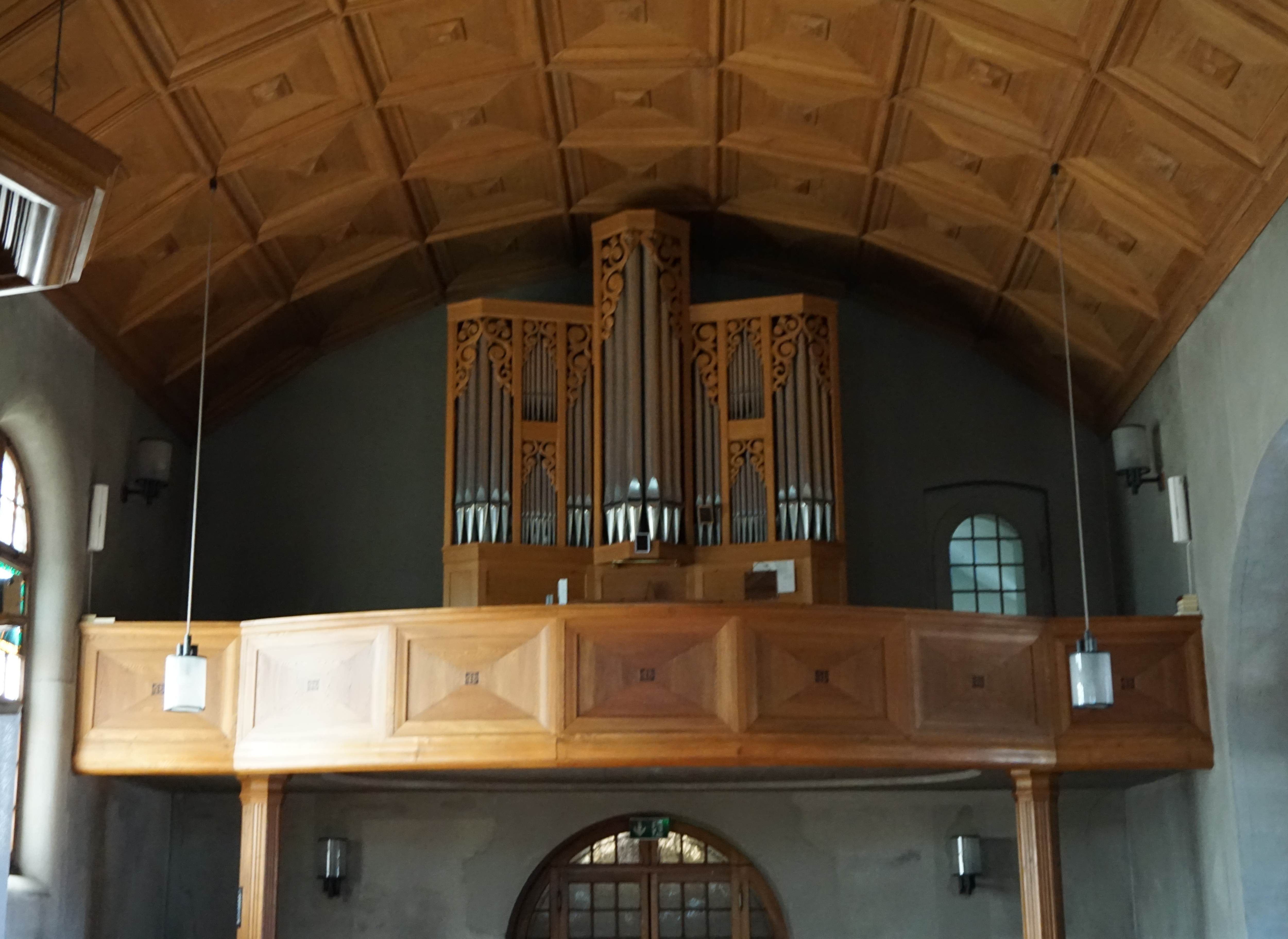 Orgelempore und Kuhn-Orgel der Kirche Hindelbank